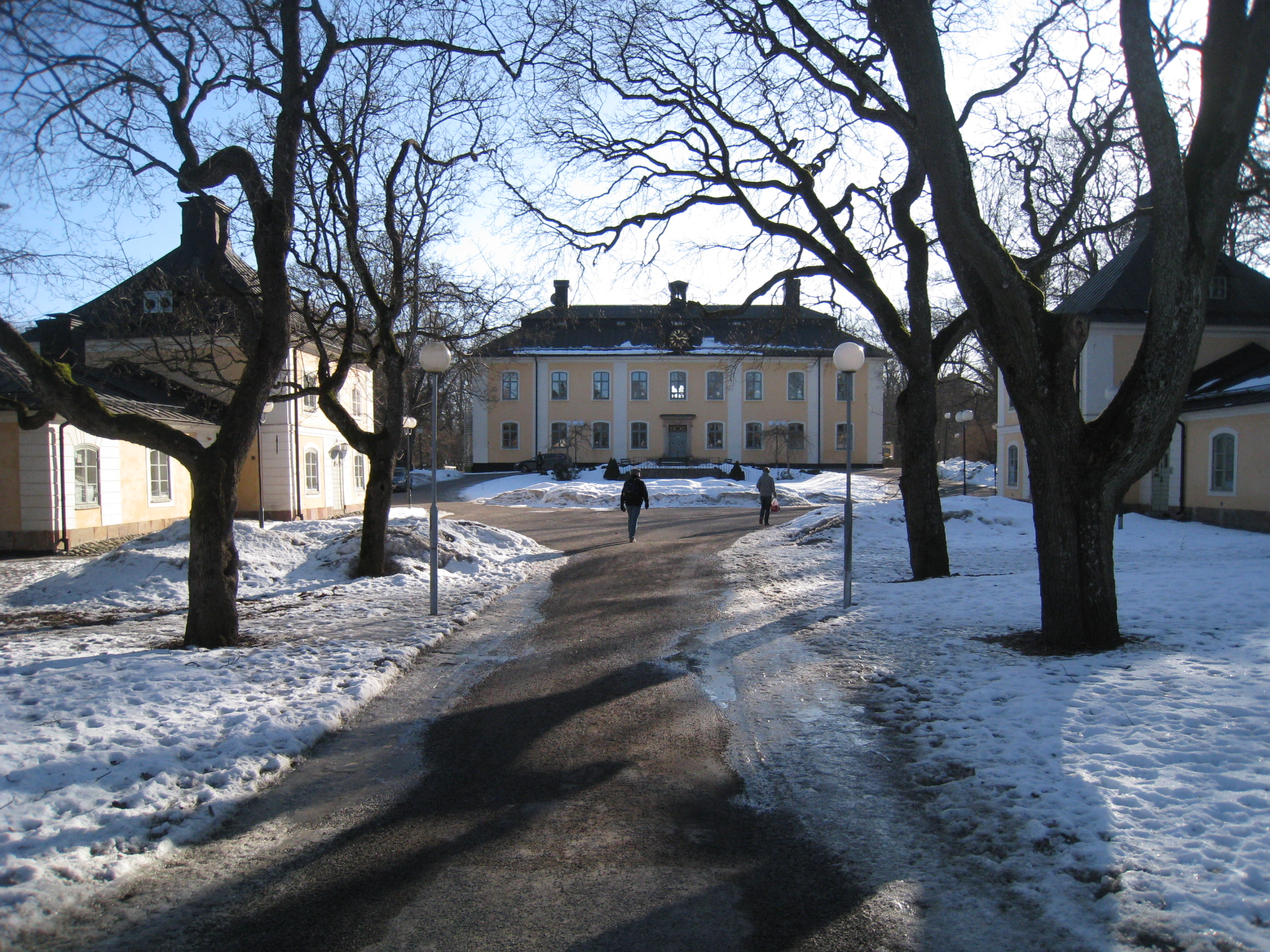 Åkeshovs slott, Bromma, Stockholm. Manbyggnaden från gårdssidan.